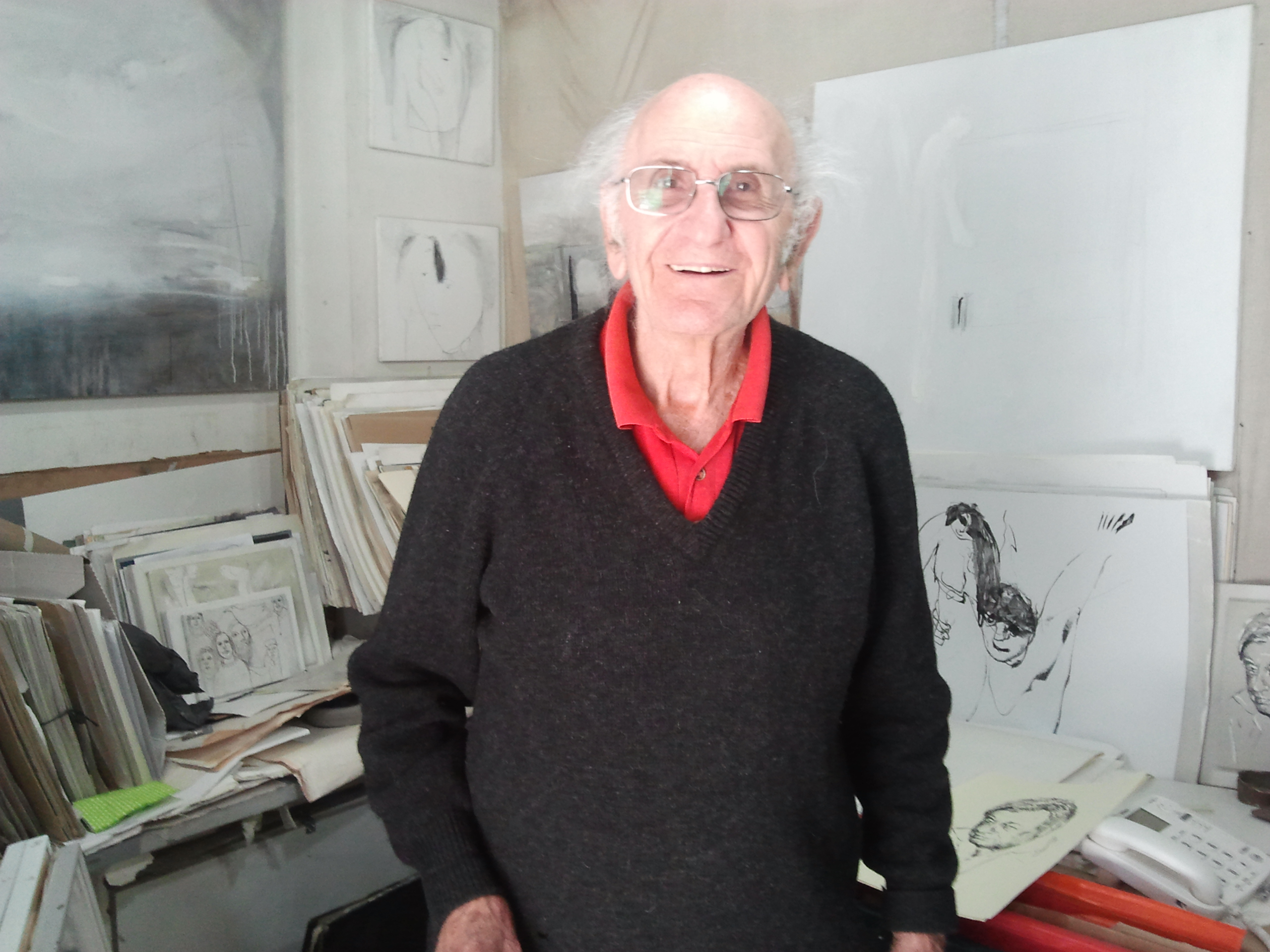 מוטקה (מרדכי) בלום הוא אמן ישראלי רב-תחומי. עבודותיו כוללות יצירות ציור, רישום, פיסול, וכן פסיפסים ושטיחי קיר. בתמונה בלום בגלריה הפרטית שלו בחוצות היוצר